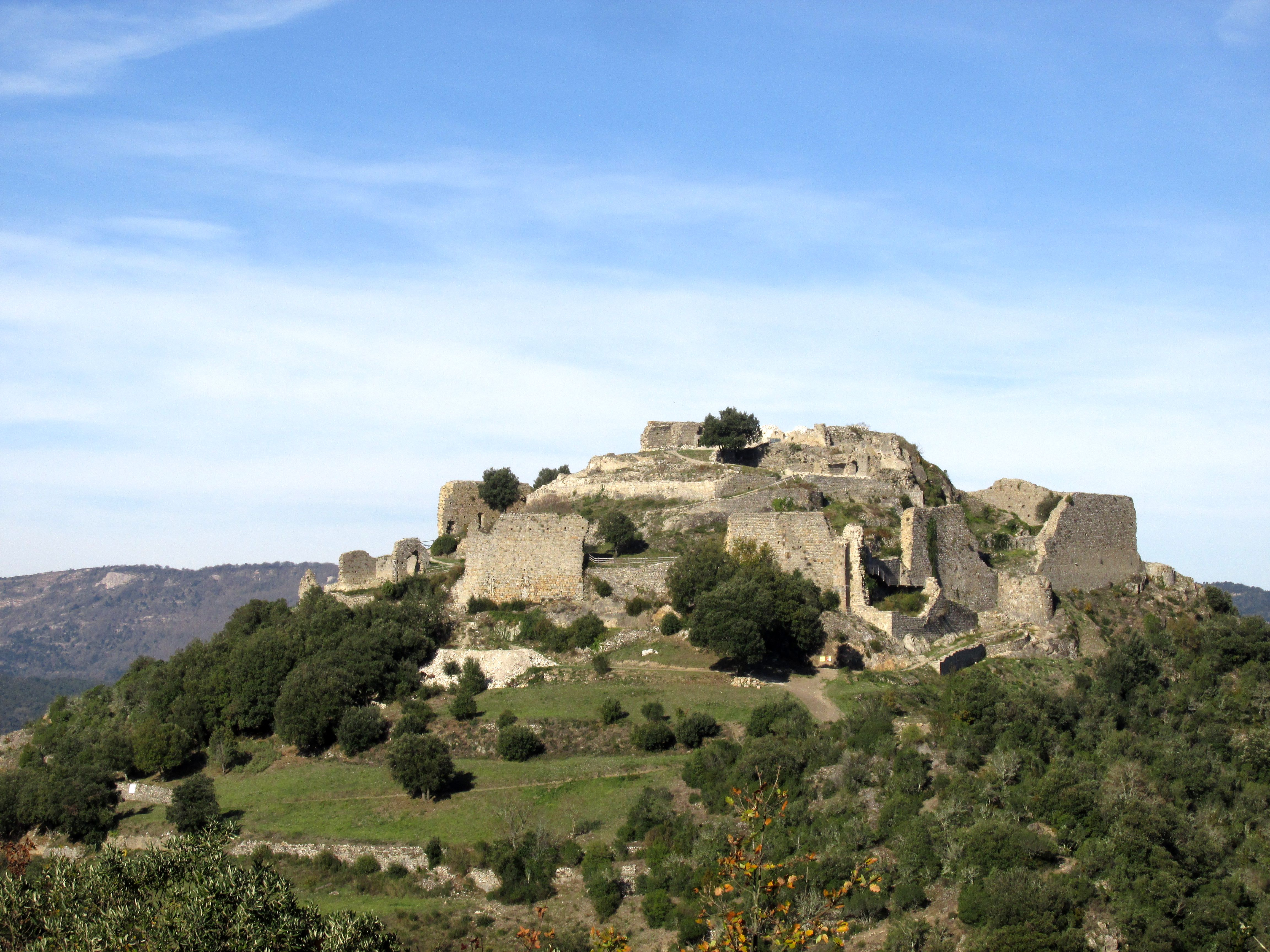 Les prairies forment l'espace occupé par le castrum.